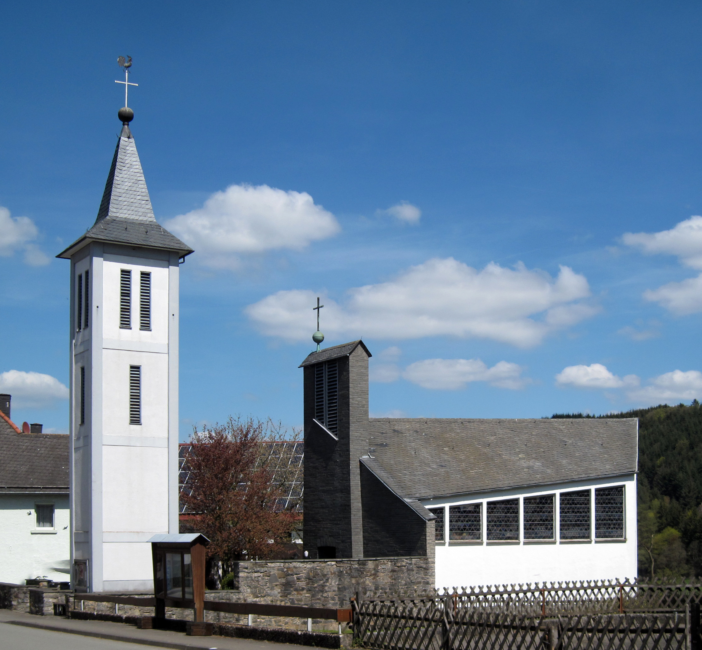 Kirche, Stormbruch, Außenansicht, Gemeinde Diemelsee, Hessen, Deutschland